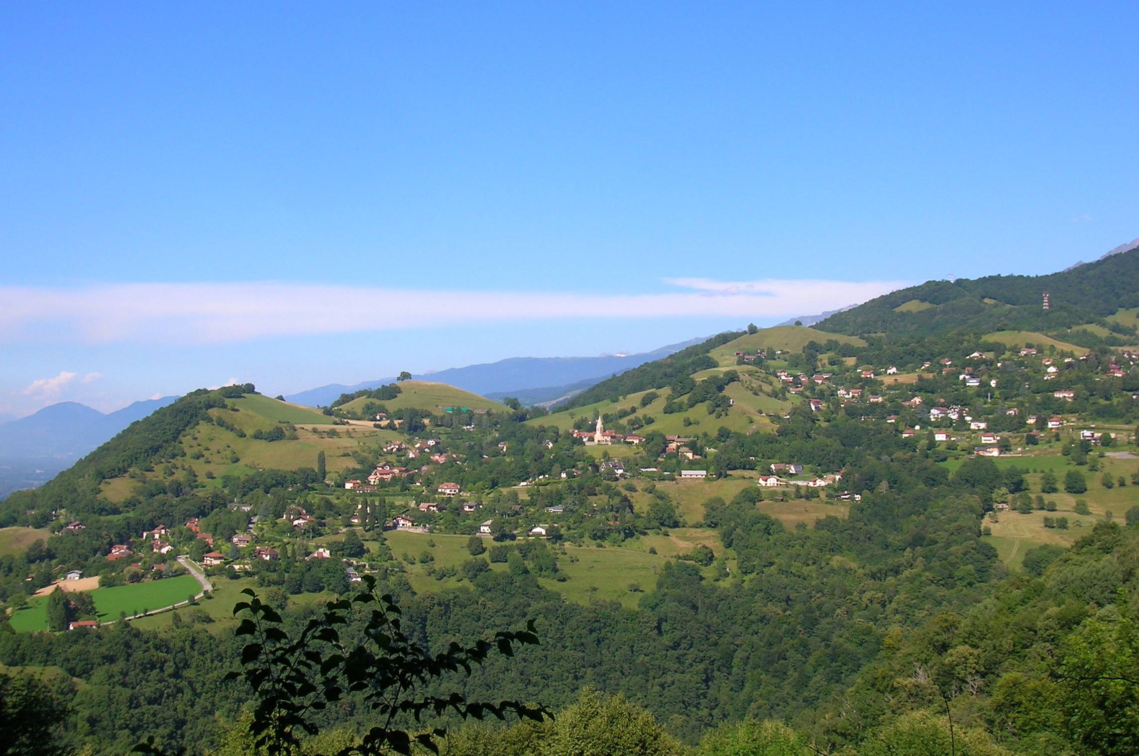 panorama di Venon (Isère)